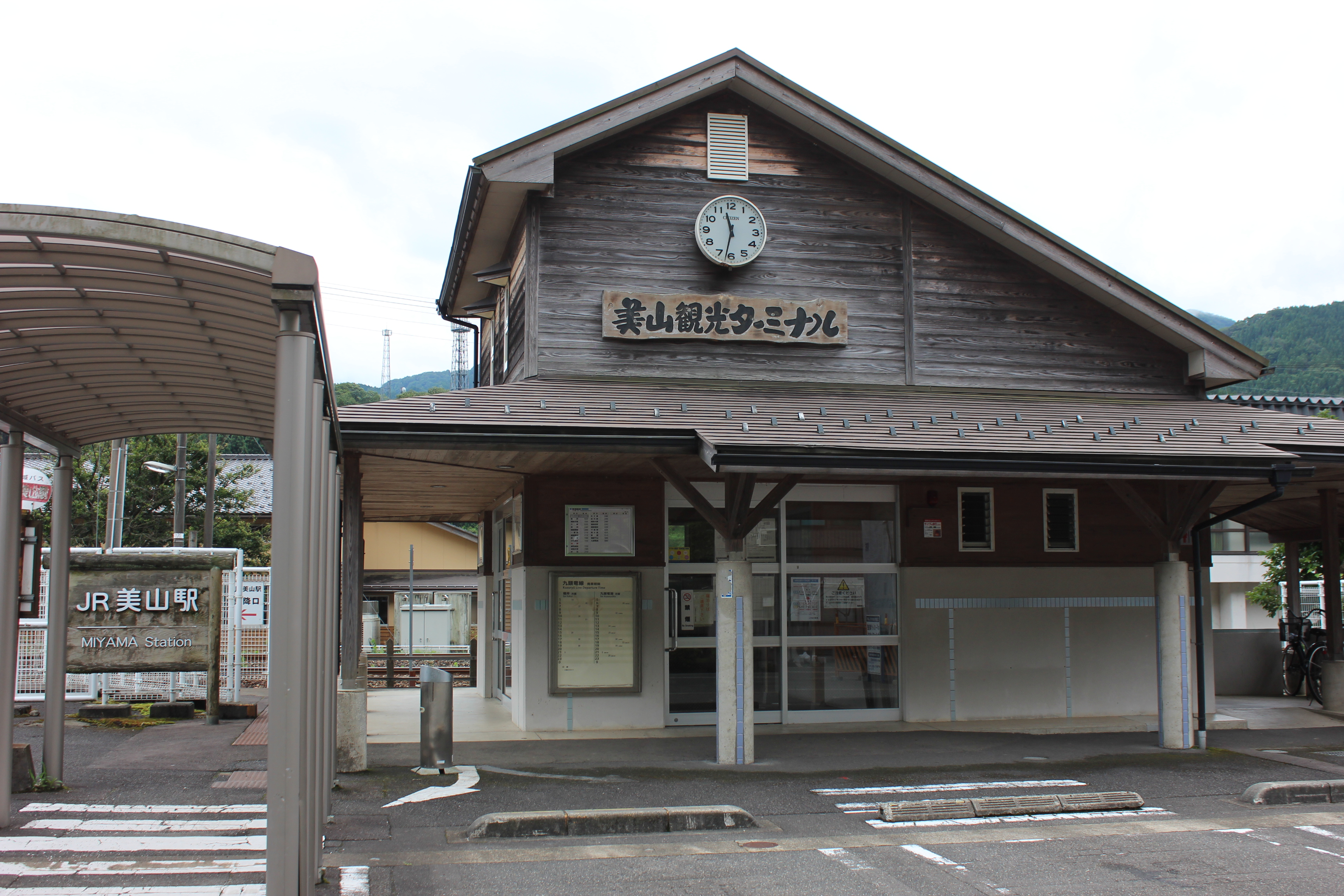 美山駅（福井県福井市） Canon EOS Kiss X5